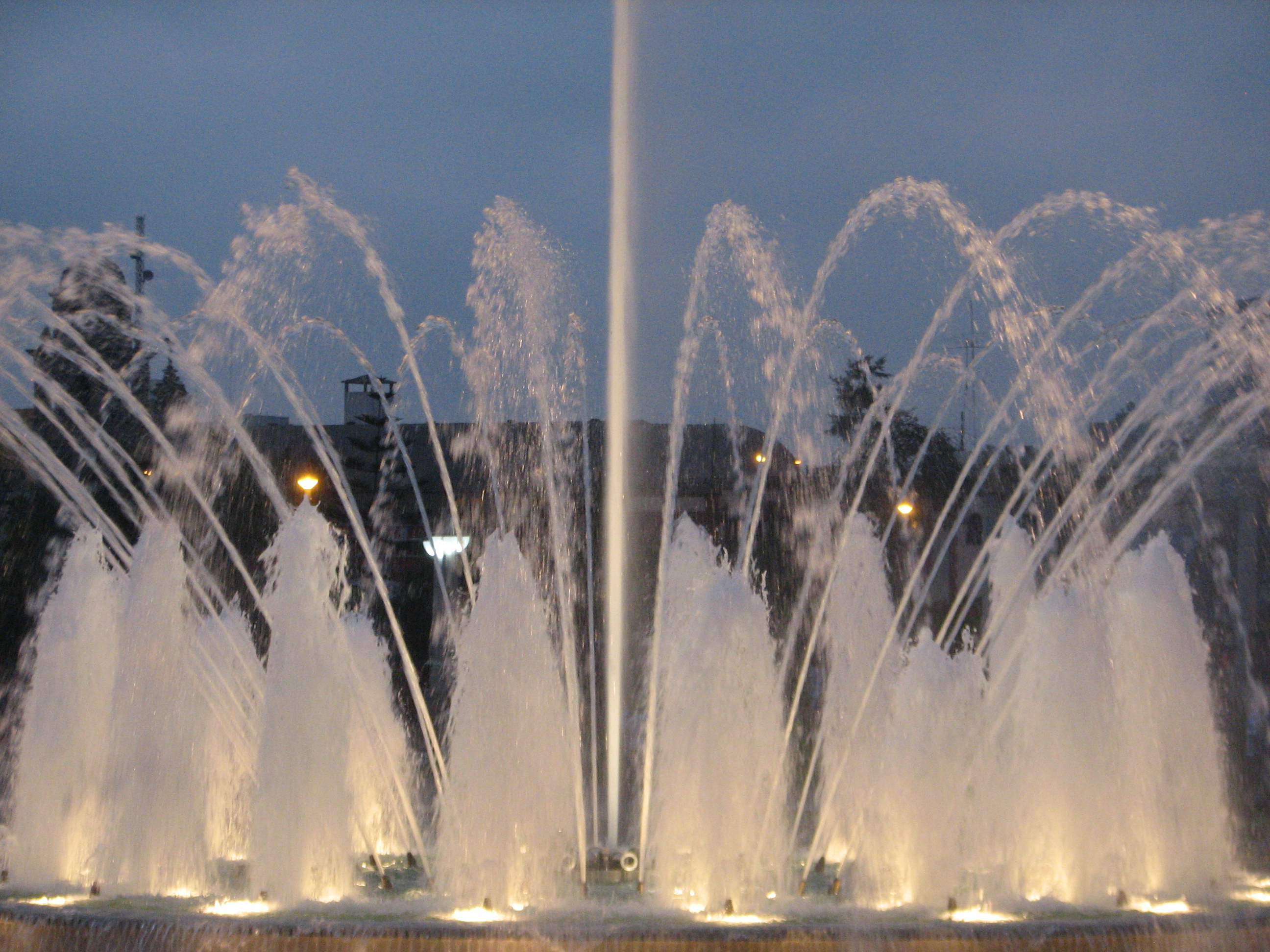 Fountain Parque de la Reserva in Lima/Lima, Peru.